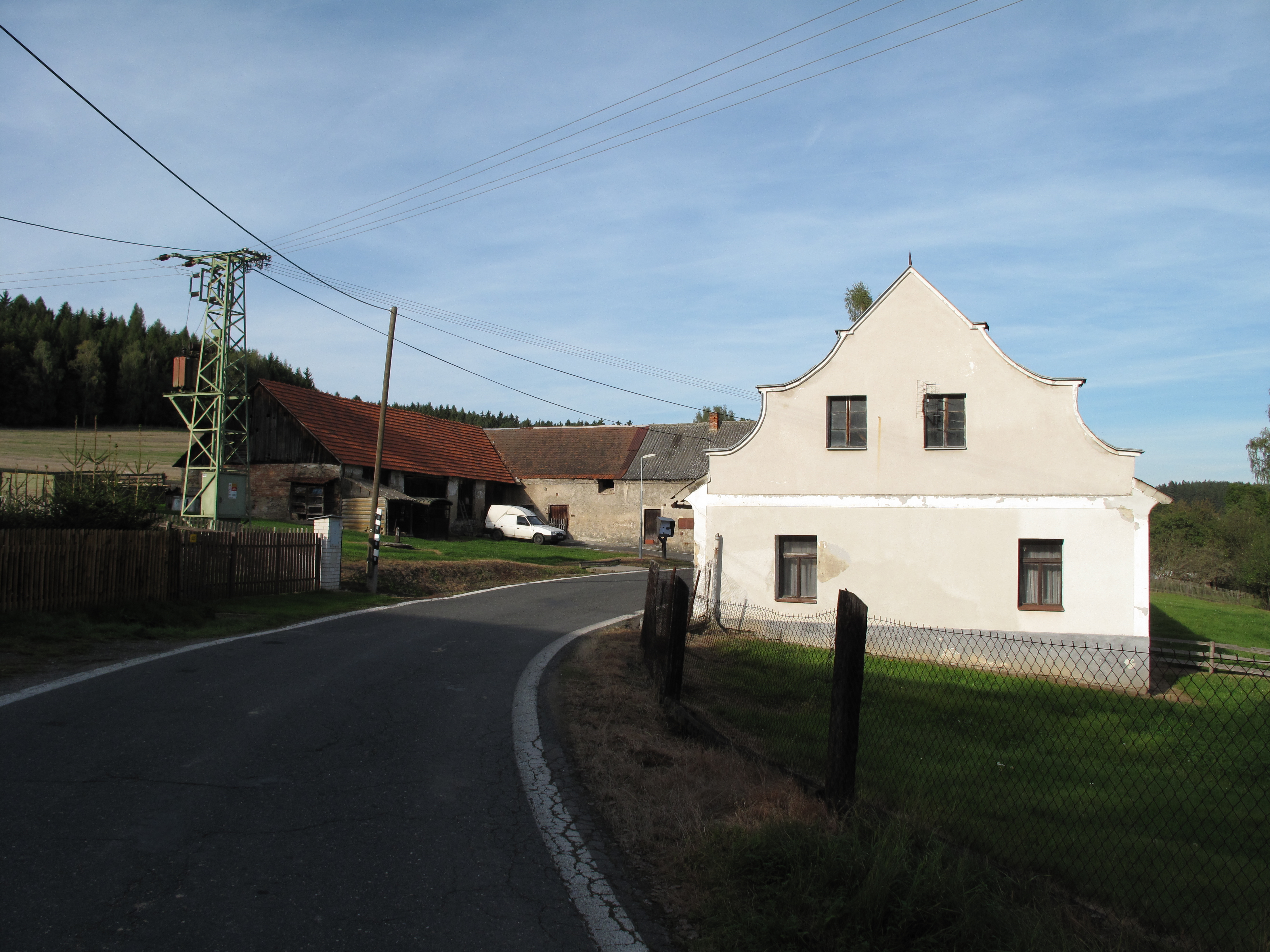 Dům v zatáčce ve Staré Huti. Okres Kutná Hora, Česká republika.